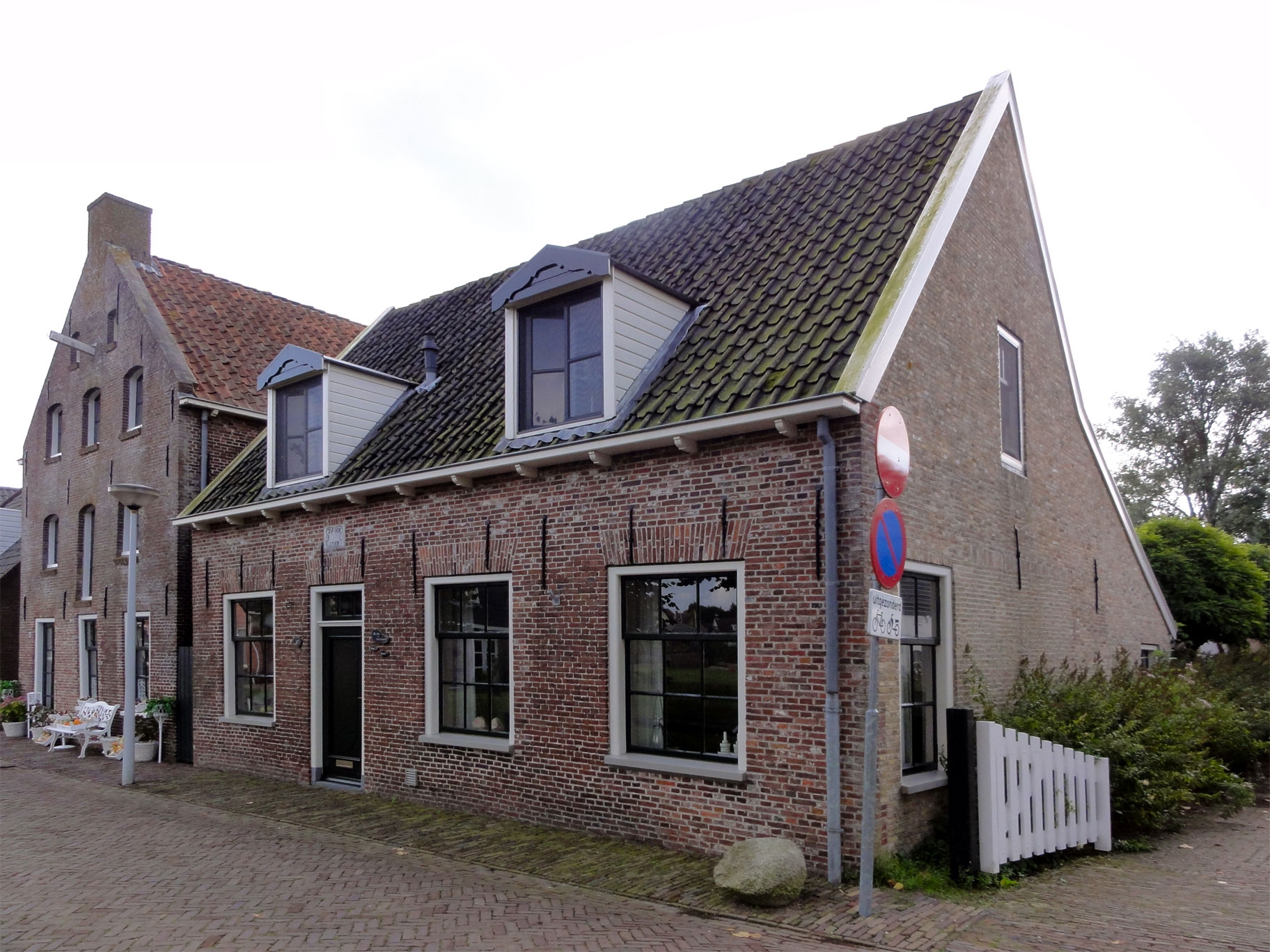 Elte Martens Beimastrjitte 12-10 Eastermar